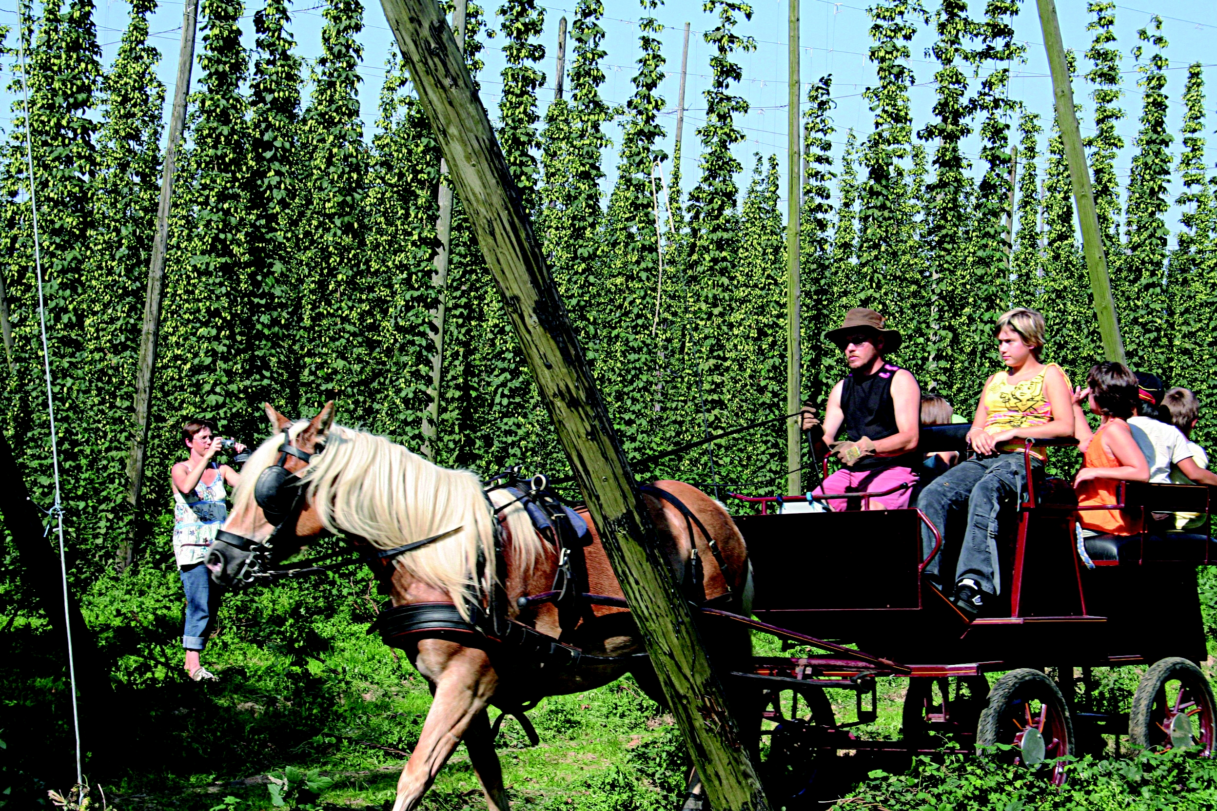 Dernier producteur de houblon à Steenvoorde installé dans le hameau du Saint-Laurent, Alain Danneels et son fils Nicolas vous font partager leur passion de leur métier en vous guidant à travers les houblonnières lors de la récolte du houblon.